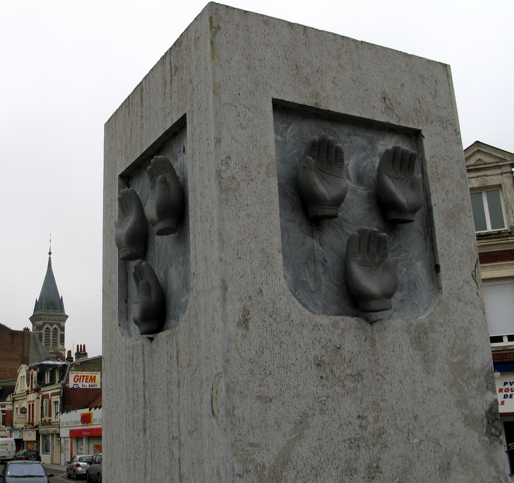 Bapaume (Pas-de-Calais, France) - Au centre du rond-point à proximité de l'hôtel-de-ville, un bloc de pierre à section carrée présente sur chacune de ses faces le blason de la ville. Ce type de bloc décoratif identifiant la commune a été installé à d'autres endroits lors du réaménagement récent du centre-ville. Tout au fond, dans l'axe de la rue devant, se dresse l'église St-Nicolas.